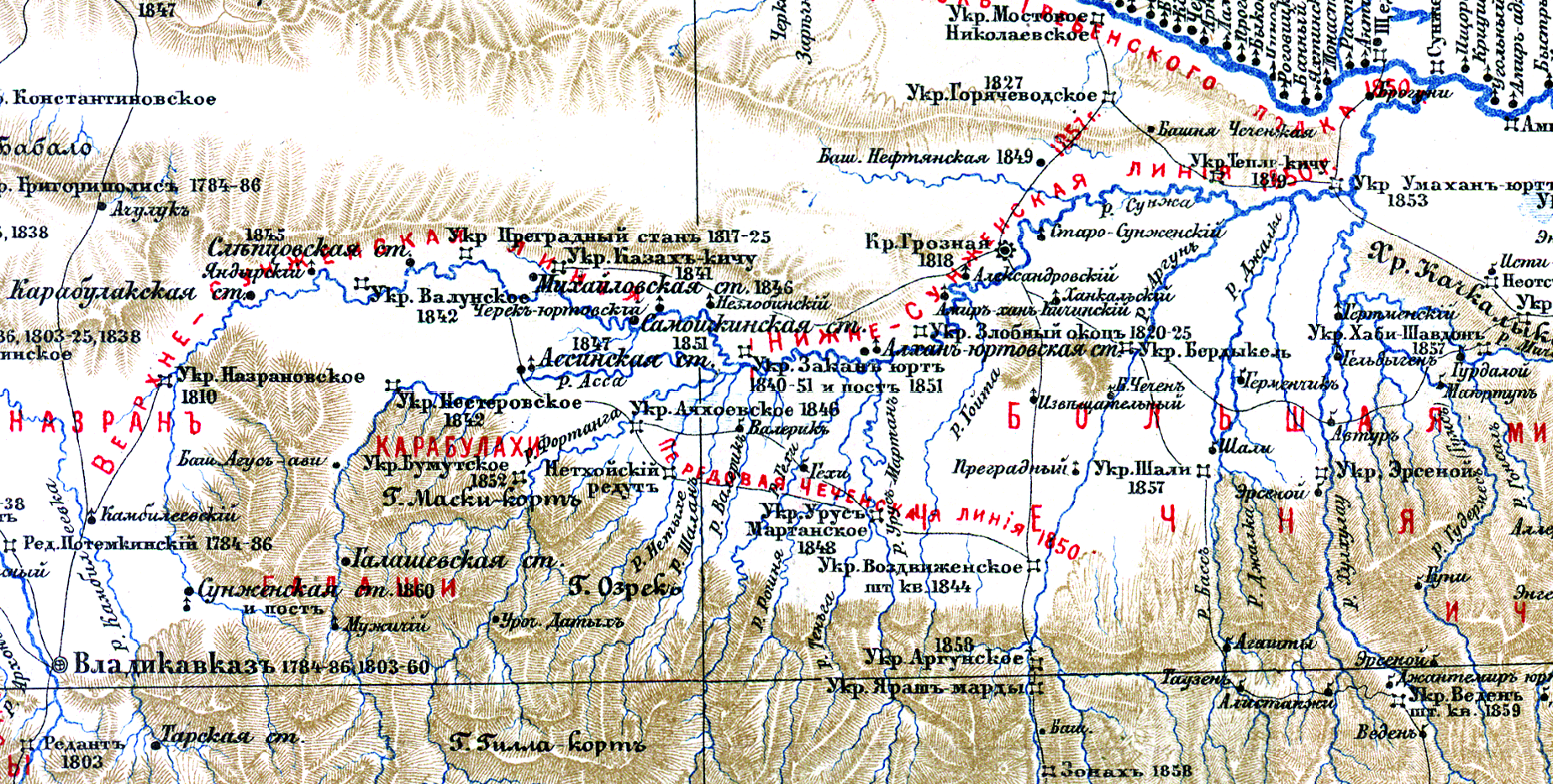 Карта Сунженской линии